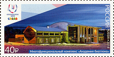 Почтовая марка России, выпущенная 2 марта 2018 года, из серии «XXIX Всемирная зимняя универсиада 2019 года в г. Красноярске. Спортивные объекты». На марке изображён многофункциональный комплекс «Академия биатлона». Дизайнер — Е. Плотникова. Номер по каталогу — 2324.